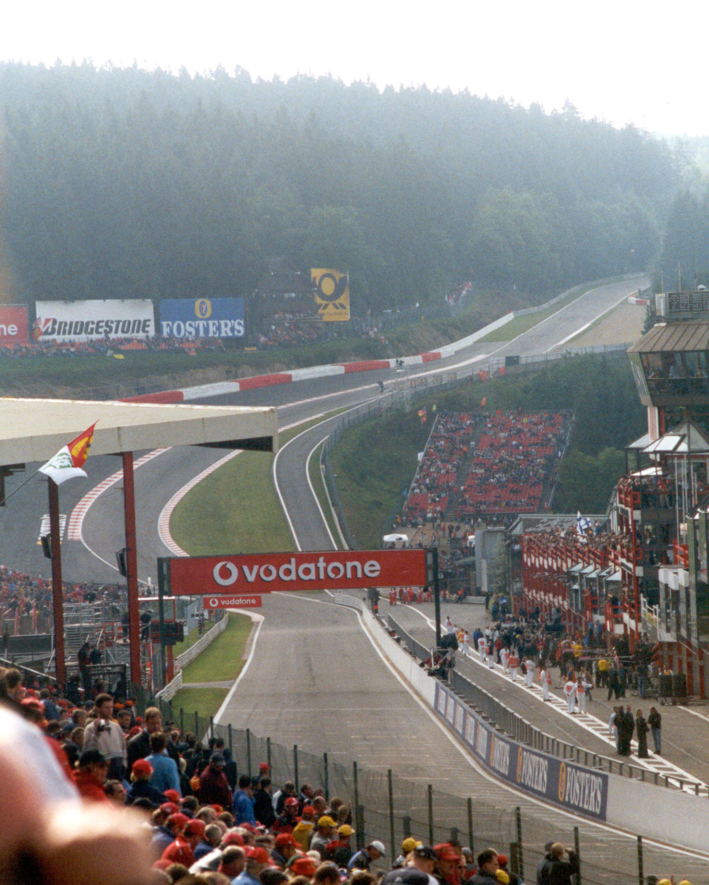 Kurve Eau Rouge der Formel 1 Rennstrecke Circuit de Spa-Francorchamps in Belgien